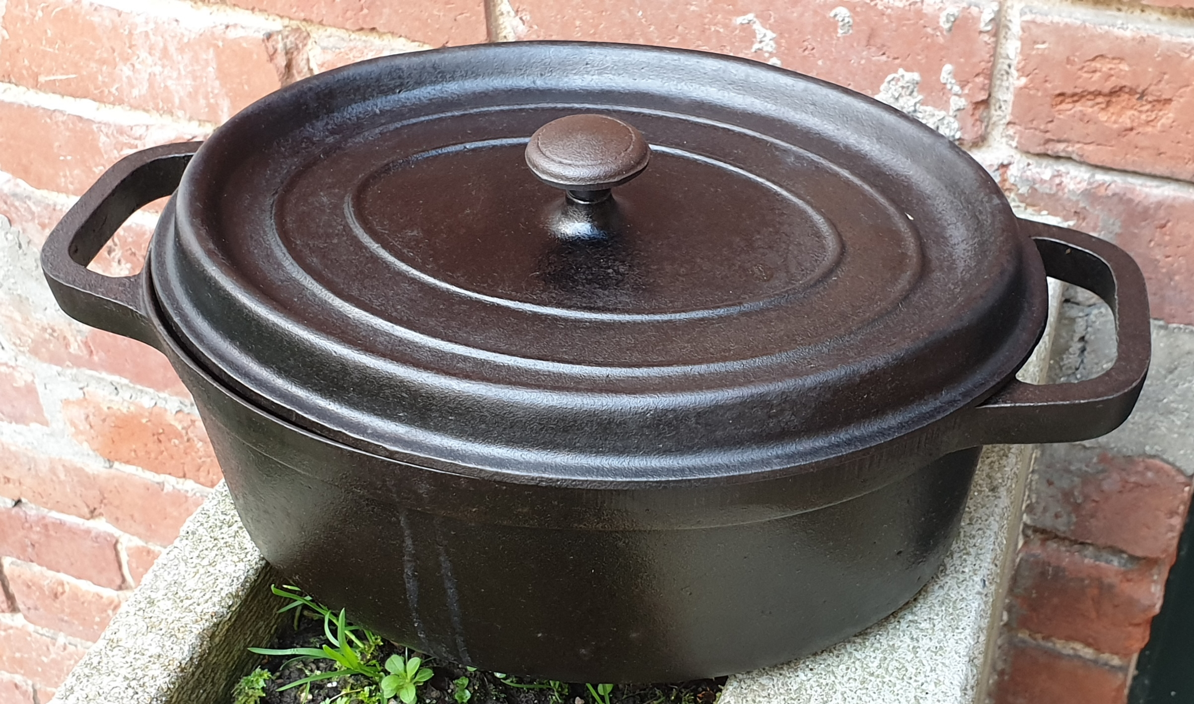 Cocotte Staub ovale, modèle d'origine en fonte brute.